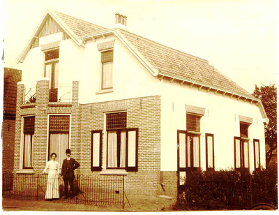 Woning in de Nieuwe Stationsstraat in Ede, gebouwd in 1913. De eerste bewoners waren Zwerus de Nooy en echtgenote Costera de Nooy-Cozijnsen. Zij poseren voor hun pas gebouwde huis.